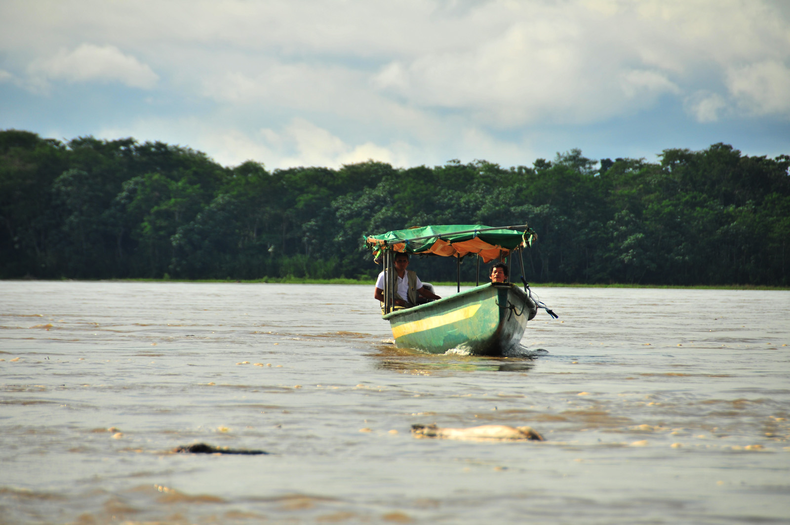 Canoas en el Rio Napo